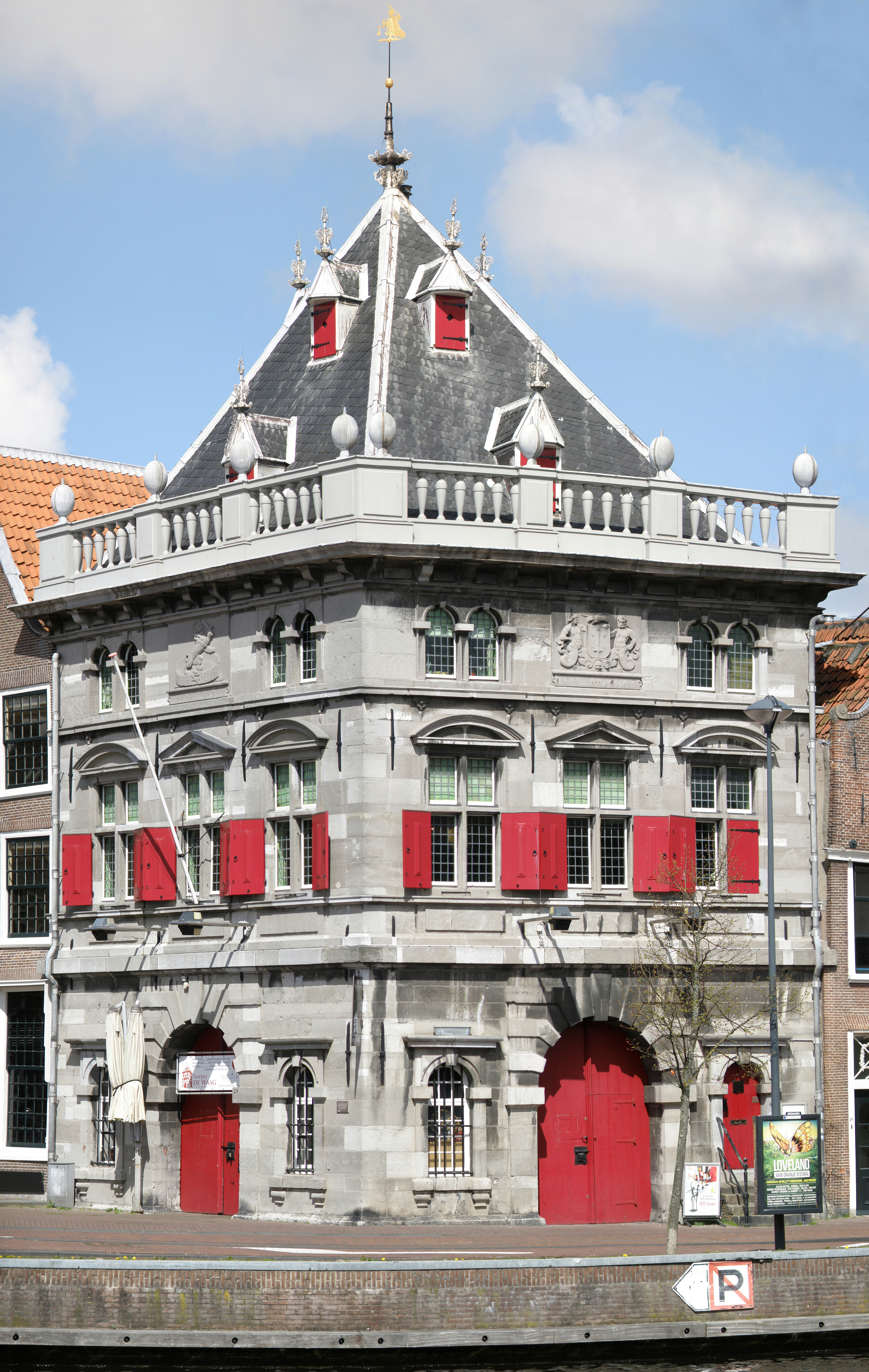 Haarlem, Nederland. Waag, eind 16de eeuw, archit. Lieven de Key.